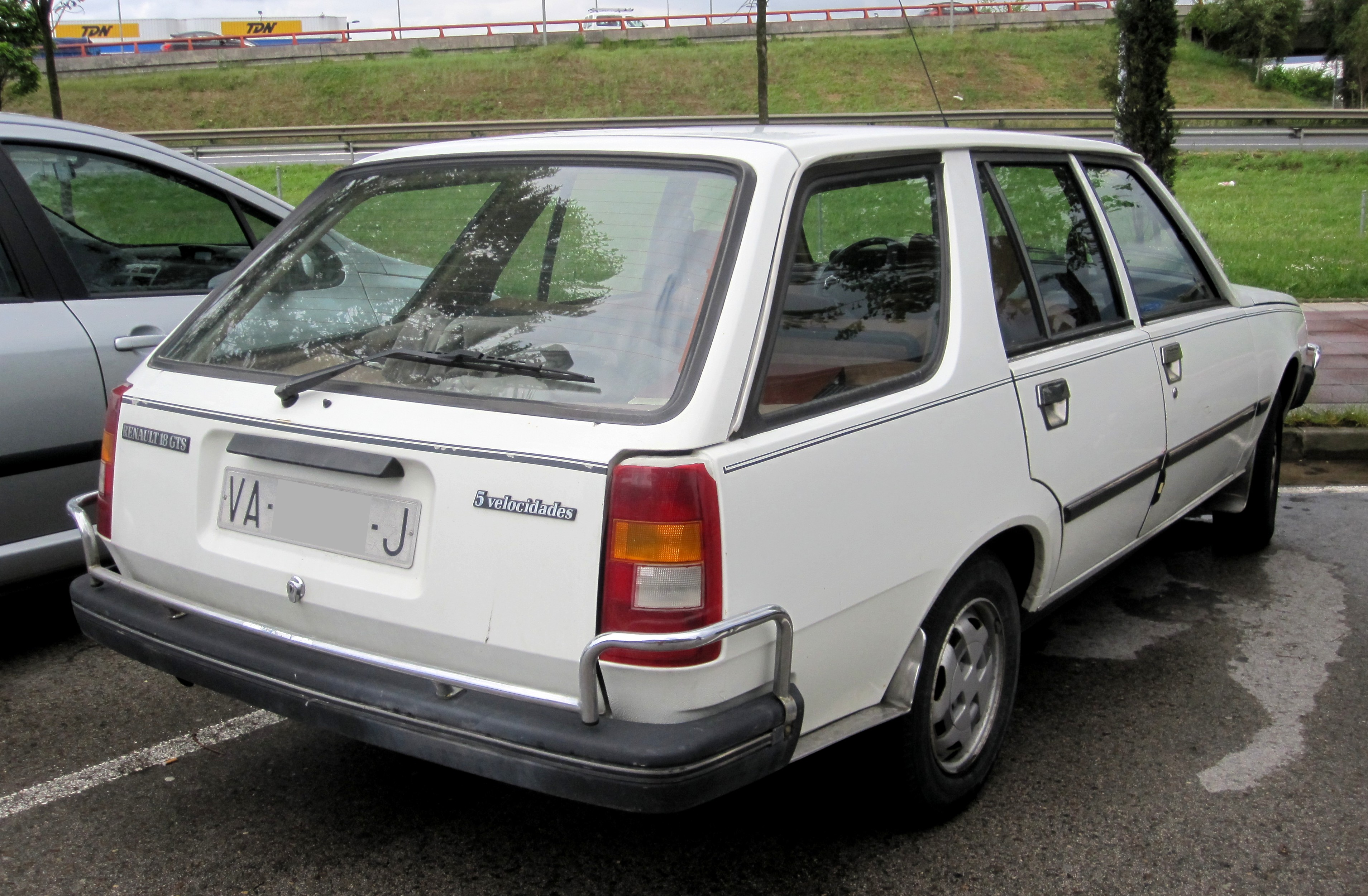 1982 plates from Valladolid (Castilla y León) but seen in Santander (Cantabria).